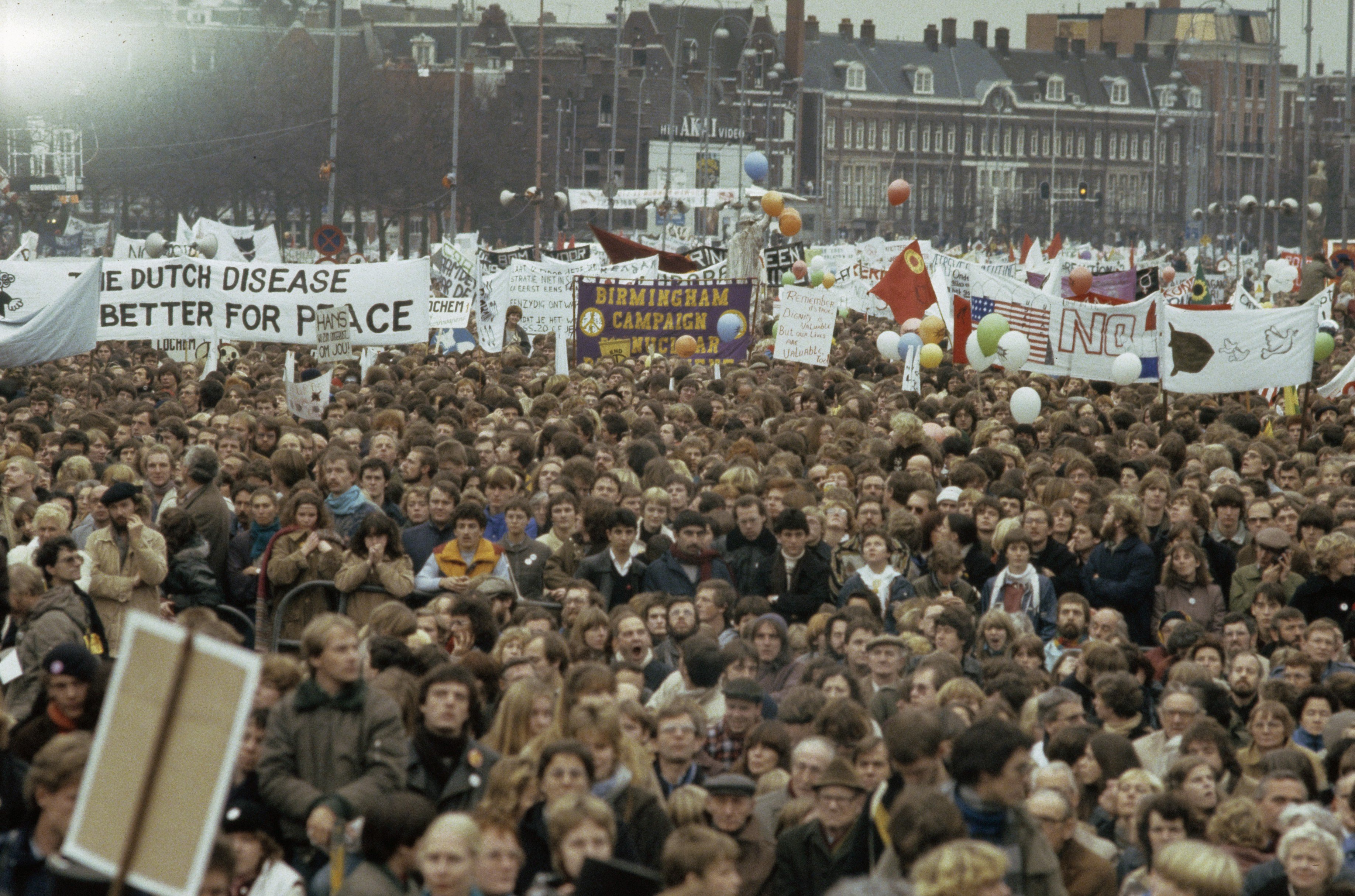 Collectie / Archief : Fotocollectie Anefo Reportage / Serie : [ onbekend ] Beschrijving : Overzicht op Museumplein met o.a. spandoek "The Dutch disease is better for peace" Datum : 21 november 1981 Locatie : Amsterdam, Noord-Holland Trefwoorden : kernbewapening, spandoeken, vredesmarsen Persoonsnaam : geeb Fotograaf : Bogaerts, Rob / Anefo Auteursrechthebbende : Nationaal Archief Materiaalsoort : Dia (kleur) Nummer archiefinventaris : bekijk toegang 2.24.01.06 Bestanddeelnummer : 253-8626